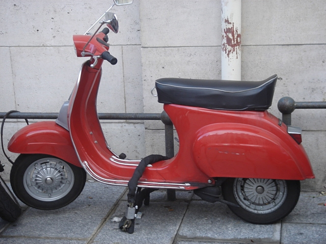 Scooter Vespa rouge garé contre la façade de la faculté de sciences économiques à Paris en 2008.